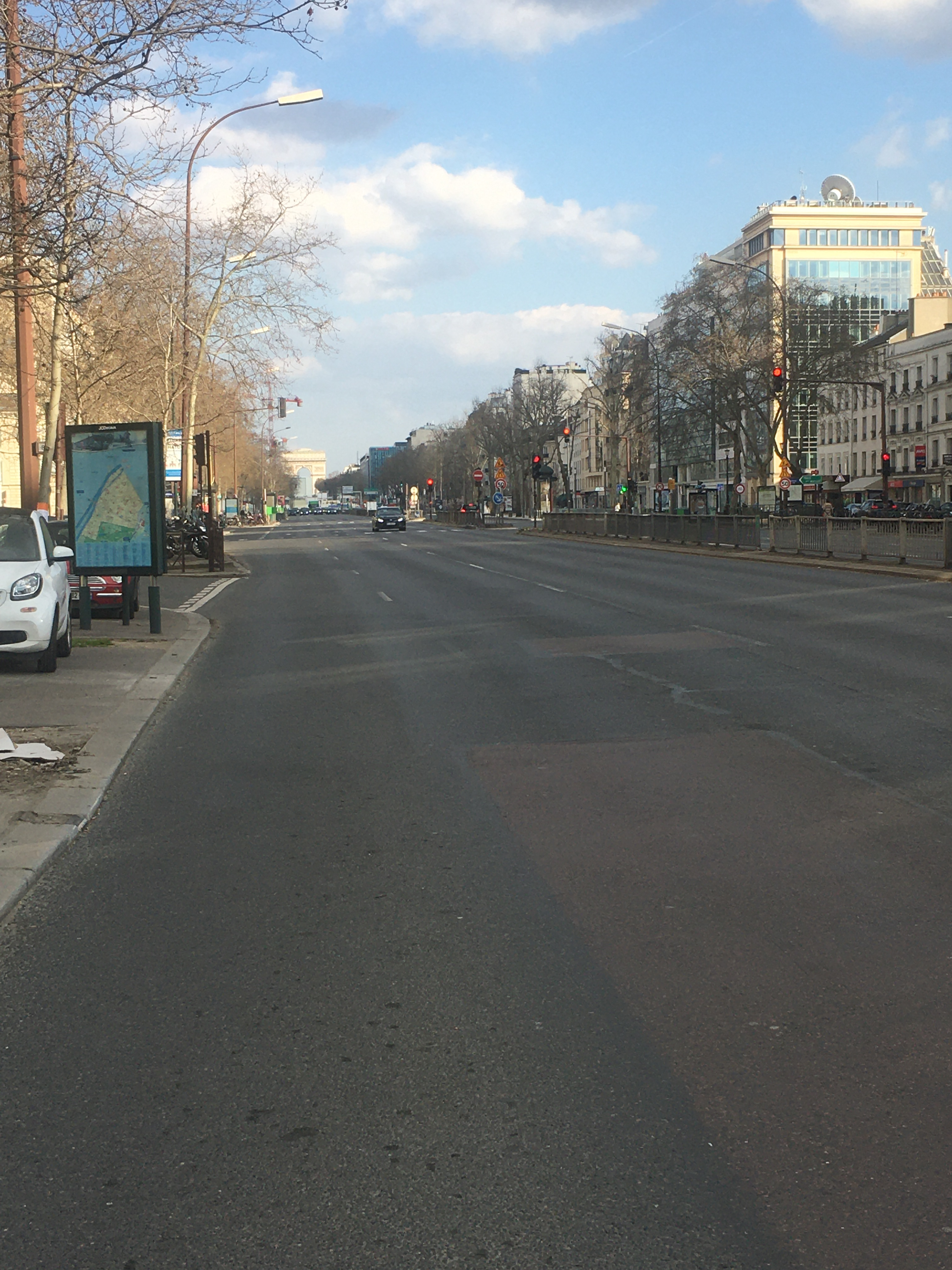 Circulation quasi-nulle sur une des voies les plus passantes d’Europe